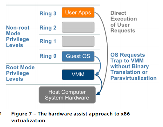 Монгол: Зураг 5 - Техник хангамжийн дэмжлэгтэй виртуалчлал